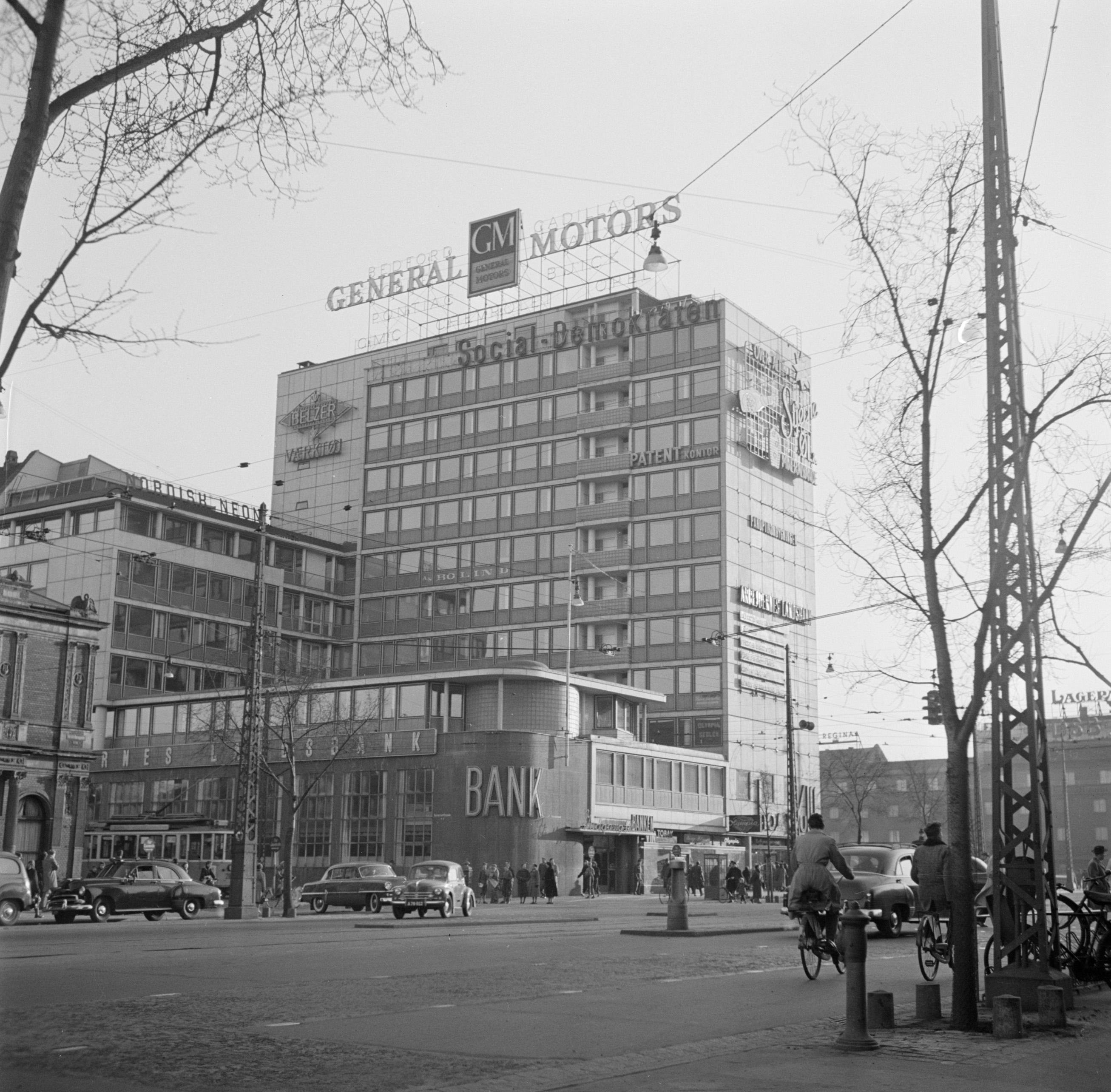 Collectie / Archief : Fotocollectie Van de Poll Reportage / Serie : Bezoek aan Kopenhagen Beschrijving : Gezicht op de Vesterbrogade met op de achtergrond v.l.n.r. een kantoor van Arbejdernes Landsbank en een kantoor- en winkelpand met reclame voor General Motors Datum : maart 1954 Locatie : Denemarken, Kopenhagen, Vesterbrogade Trefwoorden : auto's, bankwezen, fietsers, gebouwen, kantoren, straatbeelden, winkels Fotograaf : Poll, Willem van de, [onbekend] Auteursrechthebbende : Nationaal Archief Materiaalsoort : Negatief (zwart/wit) Nummer archiefinventaris : bekijk toegang 2.24.14.02 Bestanddeelnummer : 252-8821